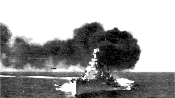 L'incrociatore pesante Bolzano in azione durante la Battaglia di Capo Spartivento.